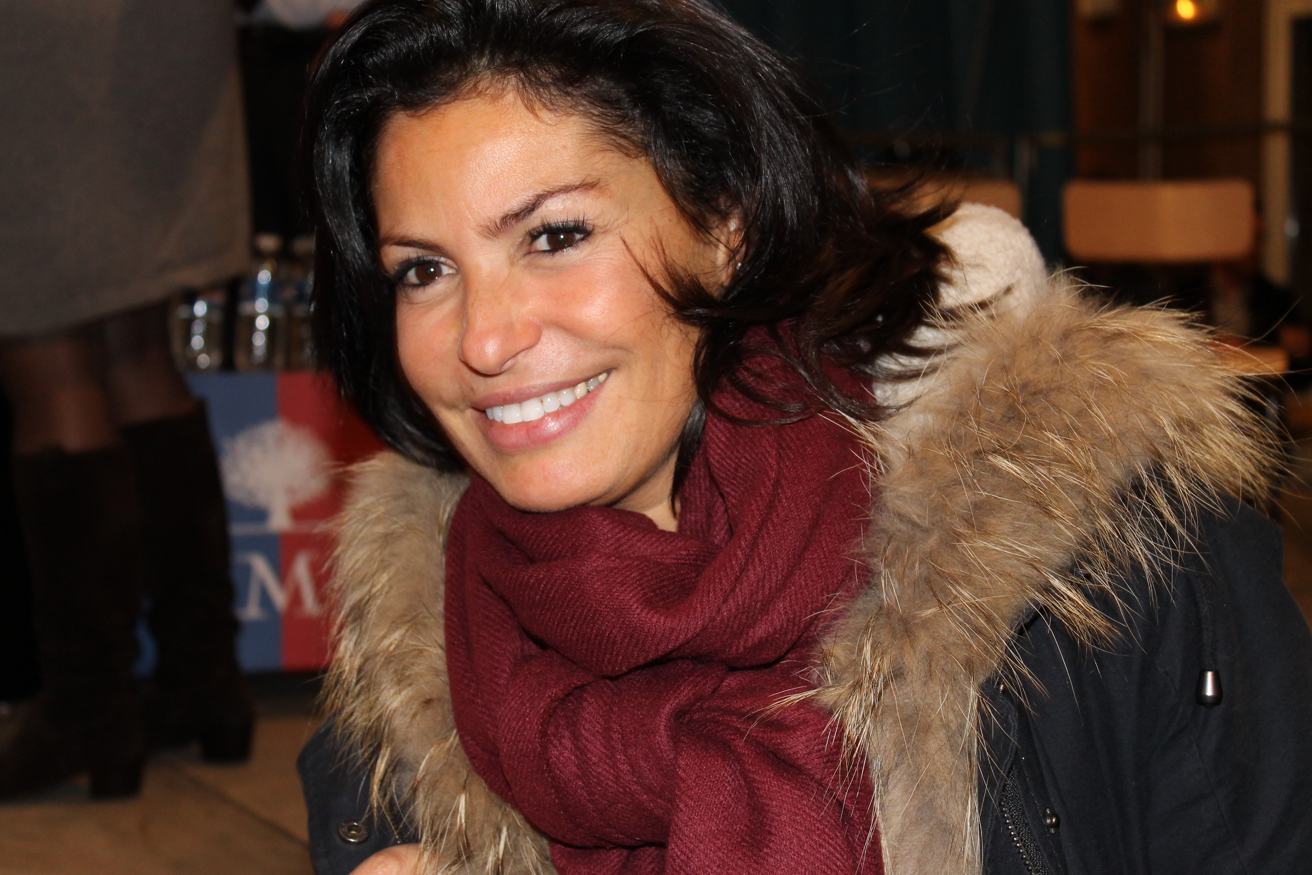 Nadia Copé à un meeting de son mari, Jean-François Copé, le 26 octobre 2012 à Nancy.